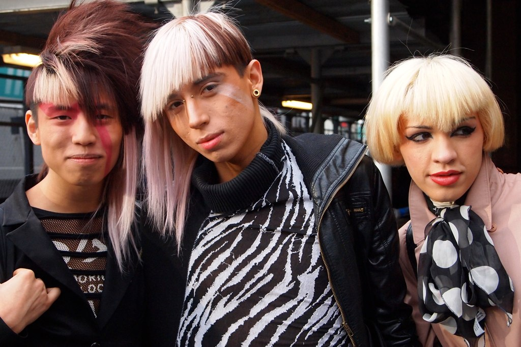 L'arc En Ciel @ MSG - 3/25/12 - 013